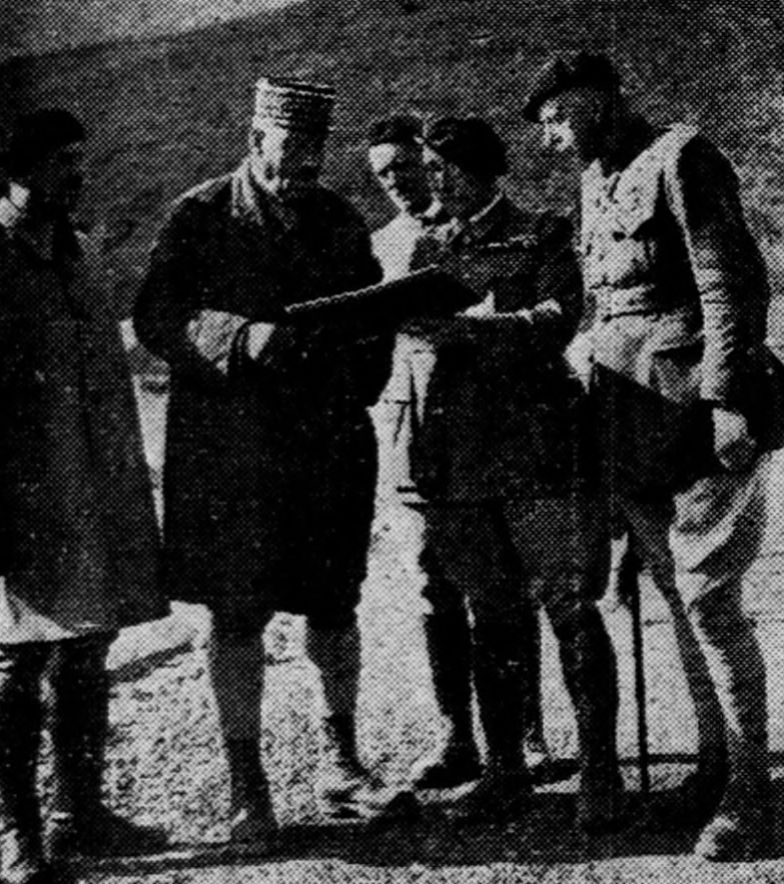 Grandes manœuvres alpines de 1938 (9 août). Au sommet du Lautaret (de gauche à droite), le général Touchon [en képi], gouverneur de Lyon et directeur des manoeuvres ; le général Lestien chef du parti bleu et le général Doyen, examinent une carte.